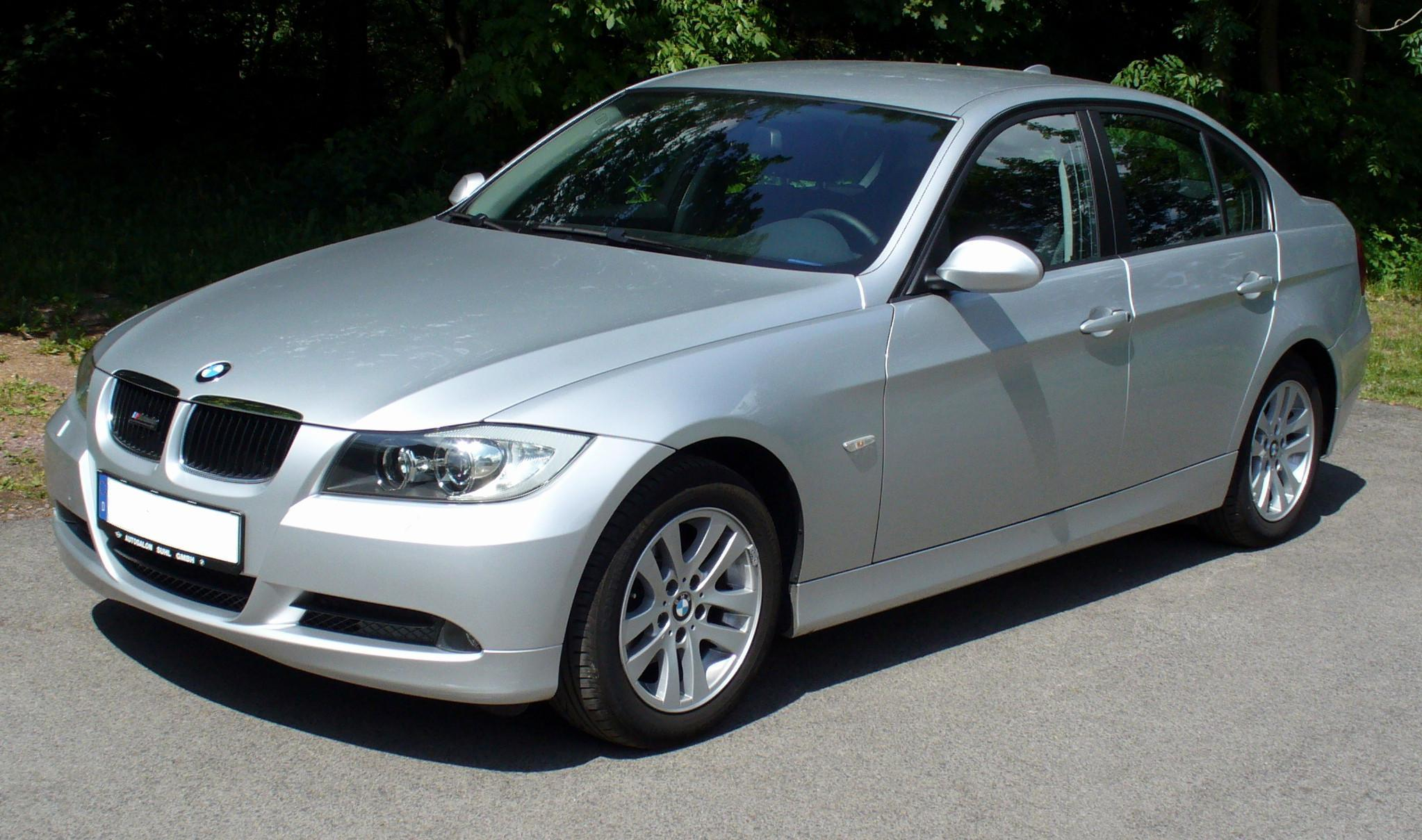 BMW 3 Series Sedan